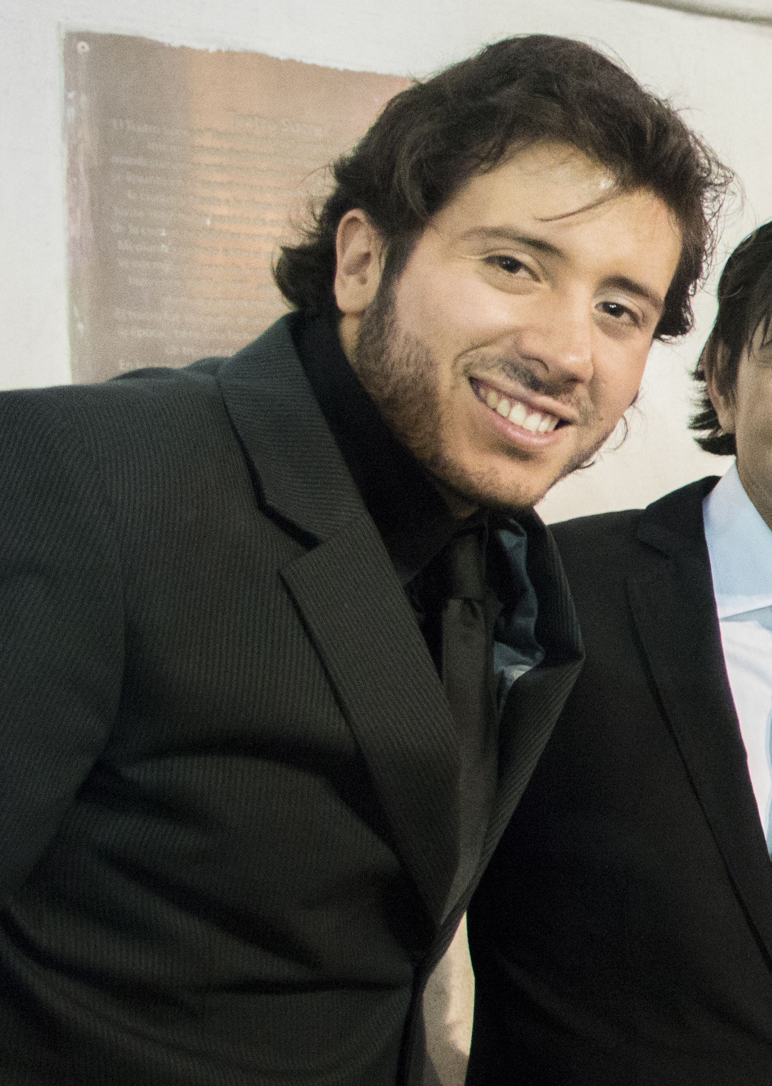 Jorge Ulloa en 2015.